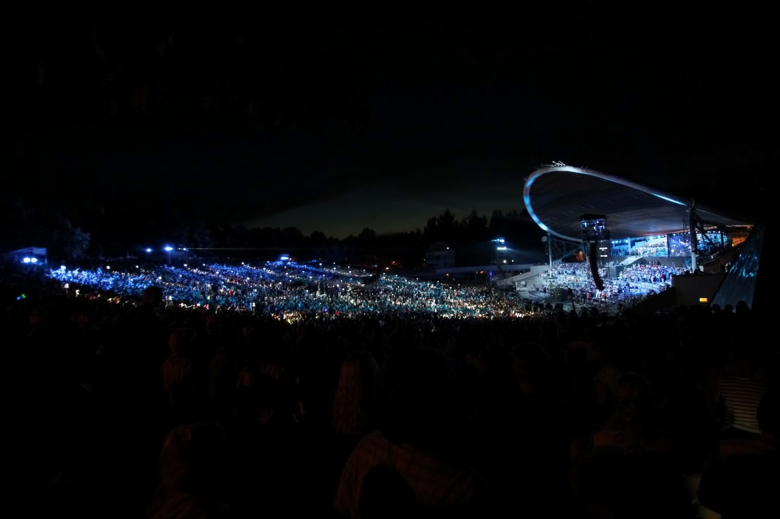 Öölaulupidu Järjepidevus